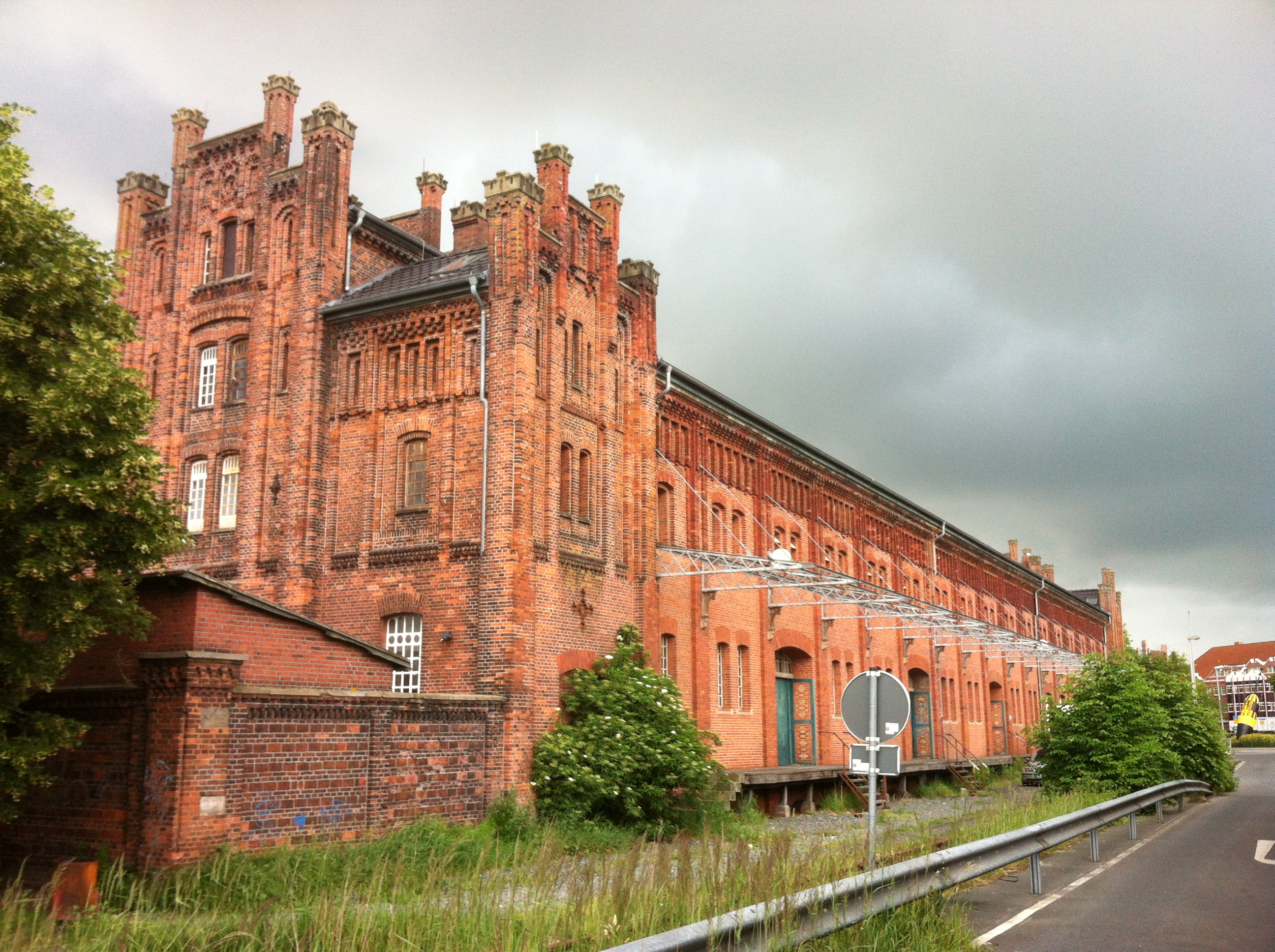 Zollhaus mit Laderampe